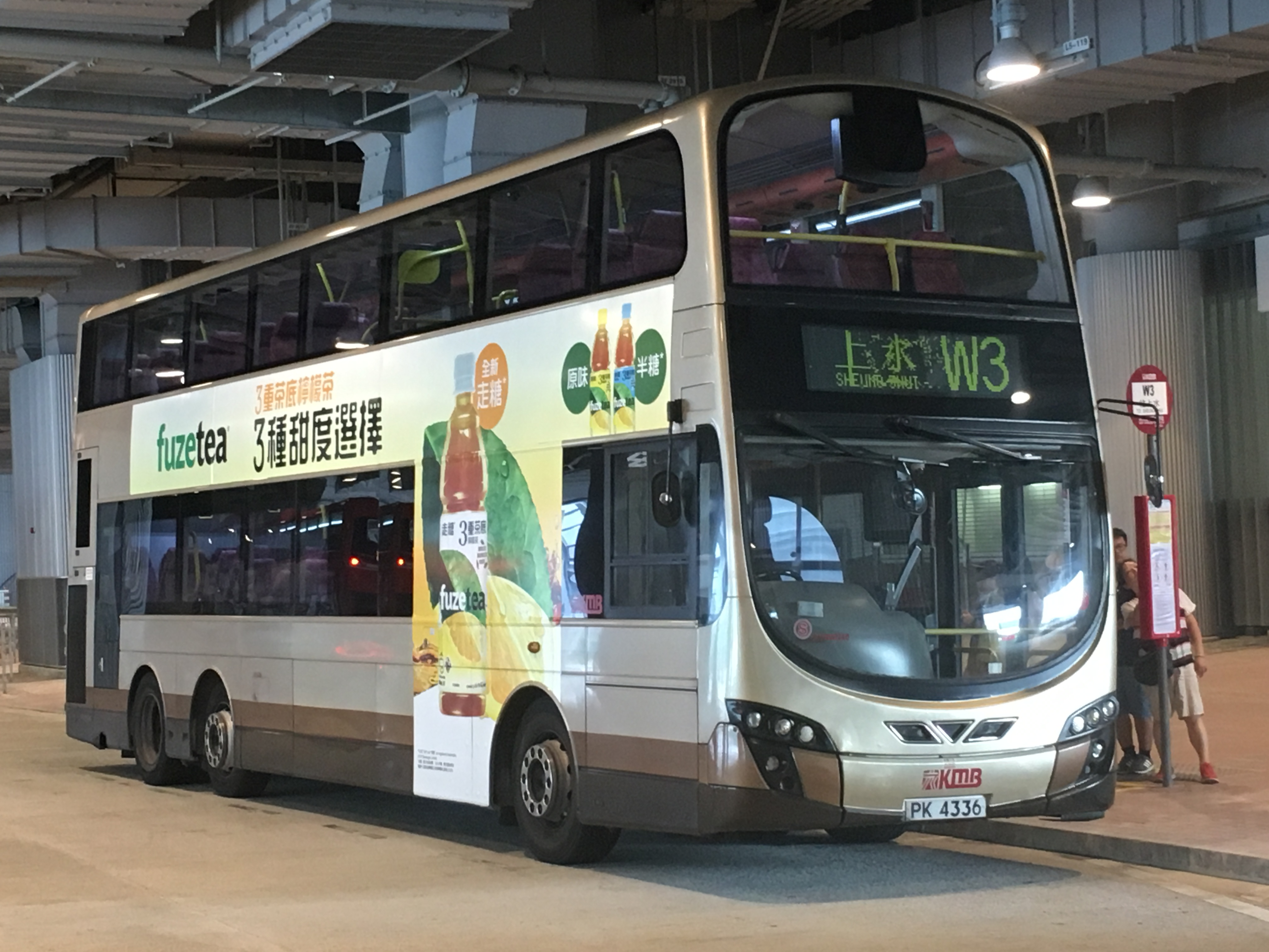 This photo is taken in West Kowloon Station Bus Terminus.